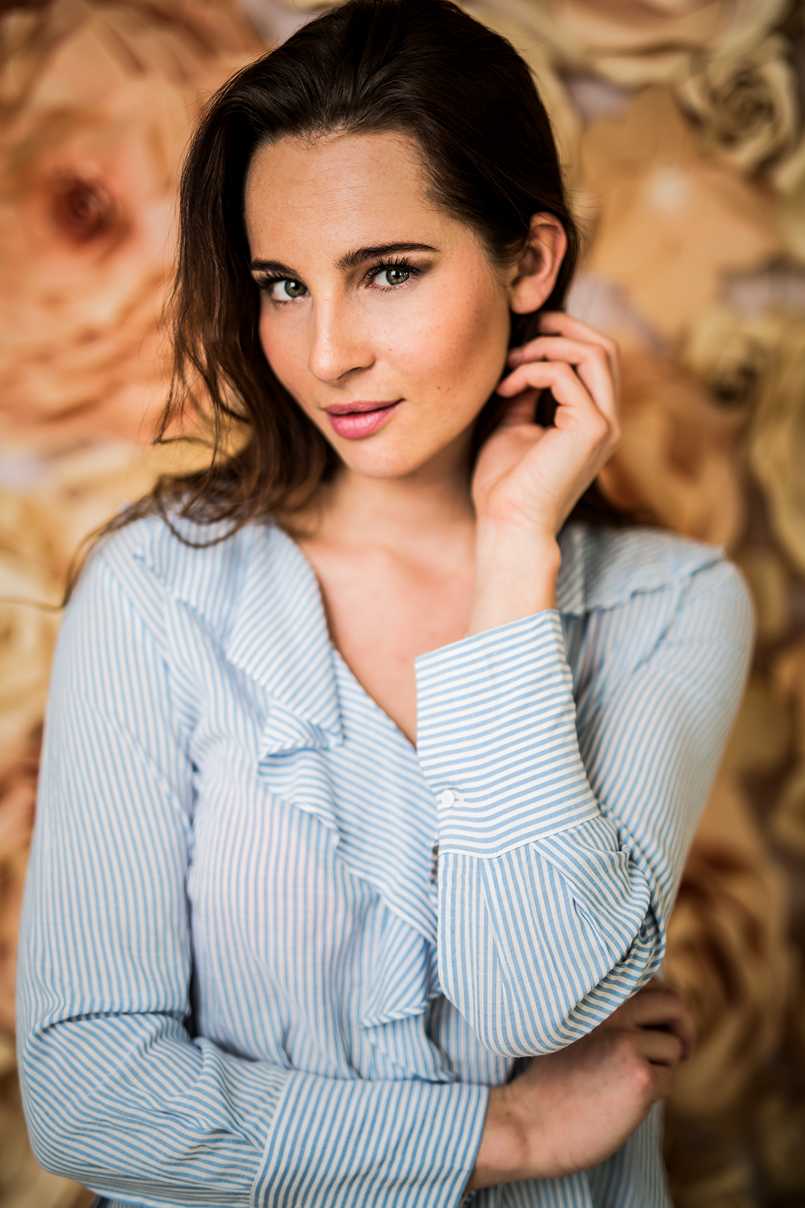 Aktuelle Aufnahme von Nicole Mieth - 2018